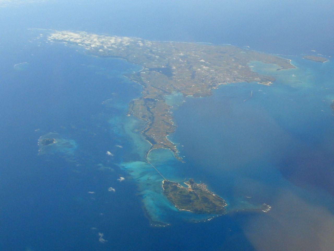 Miyako-jima from sky: Miyako Island, Miyako city, Okinawa, Japan / 沖縄県宮古島（空撮）